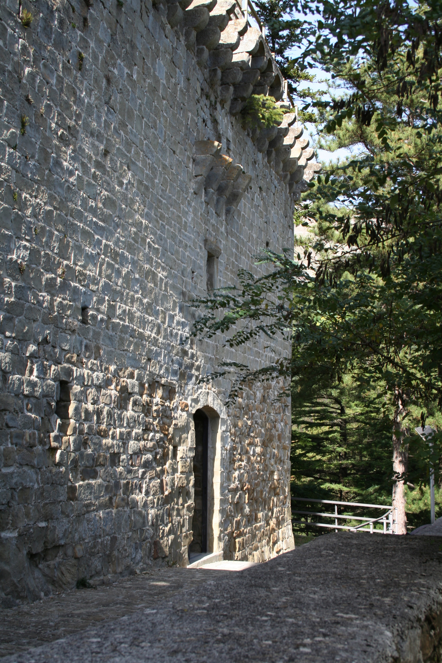 Ingresso alla fortezza della Rocca di Arquata del Tronto, in provincia di Ascoli Piceno.